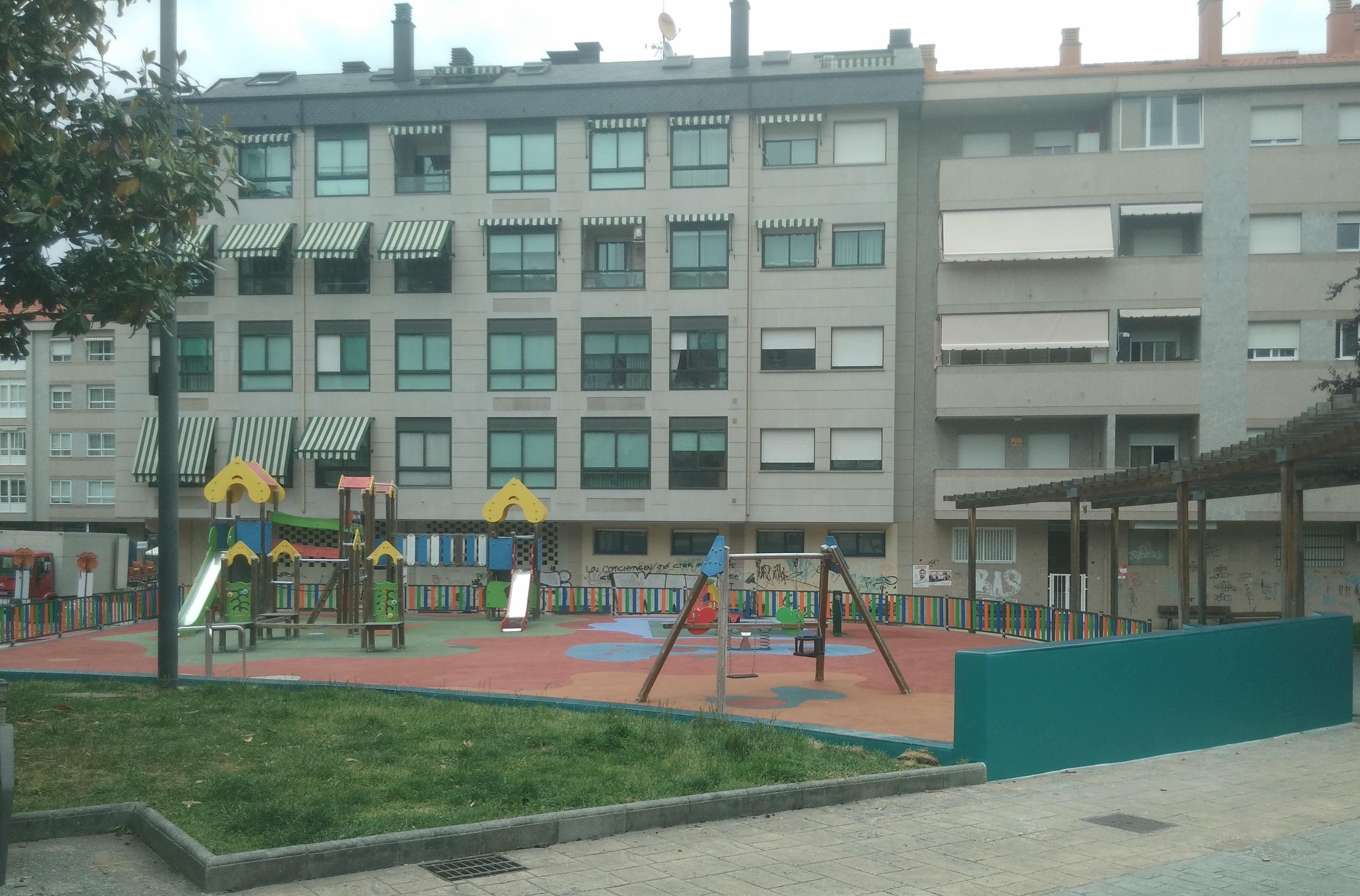 Parque infantil del barrio de O Couto.